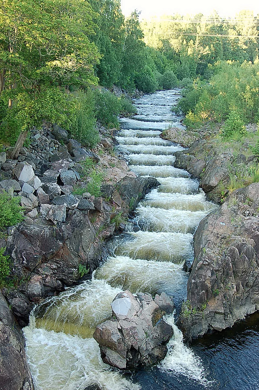 Laxtrappa vid kraftverket i Gullspång